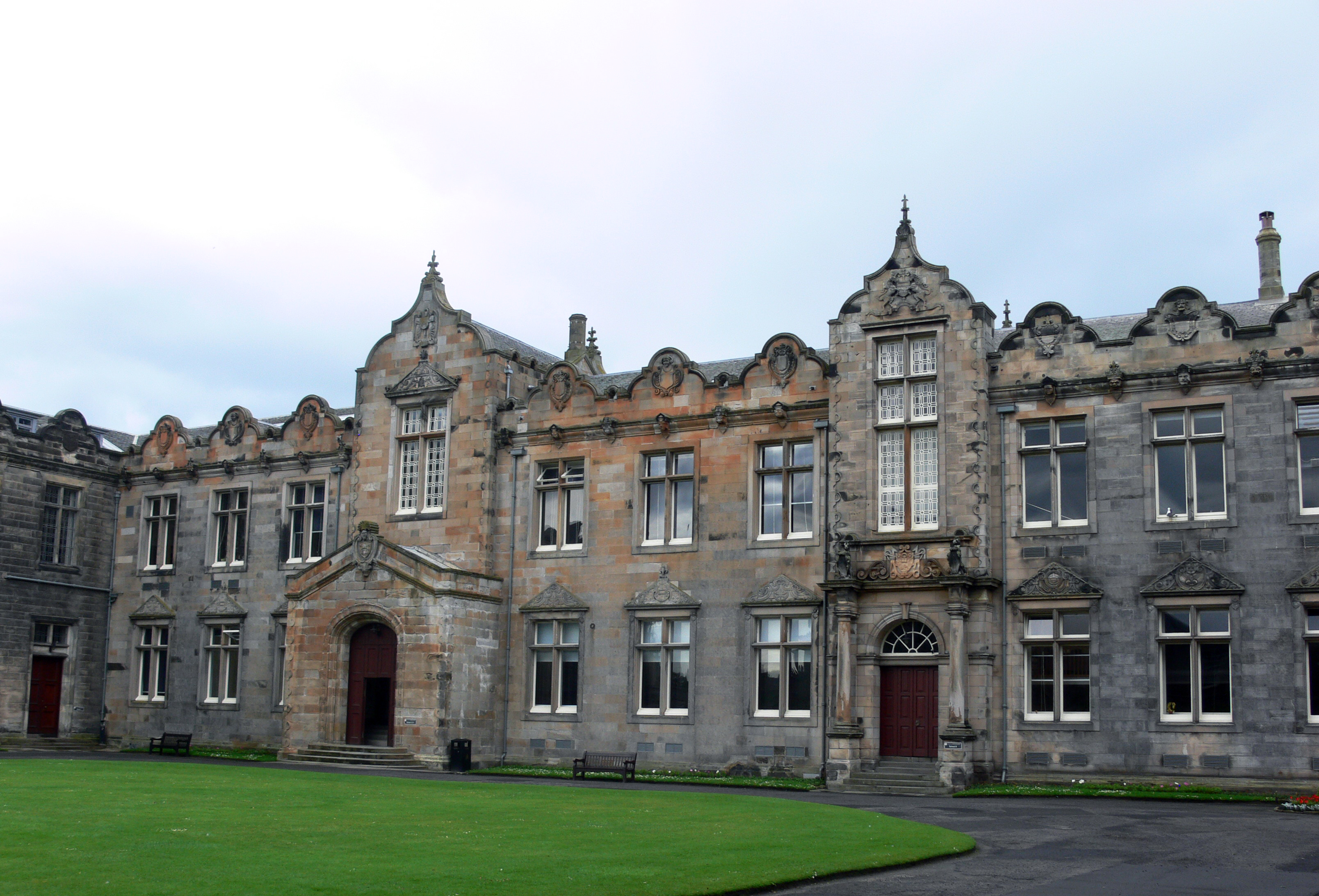 St Andrews - St Salvator's Quad